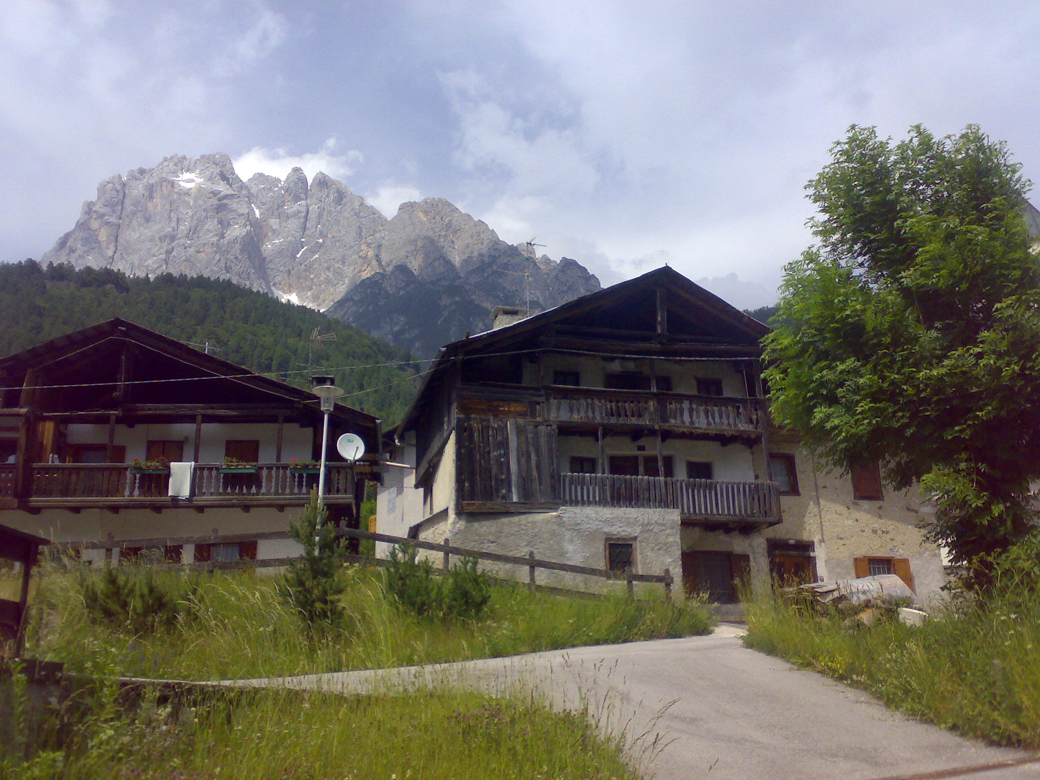 L'Antelao da Peaio di Vodo di Cadore